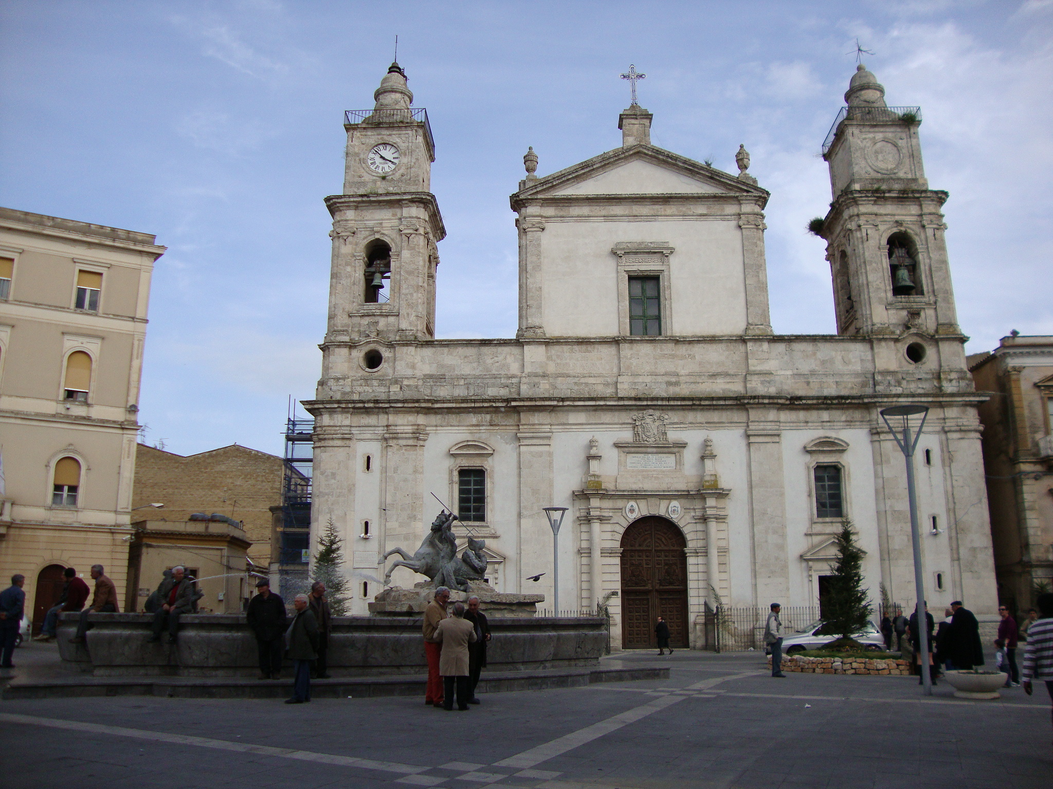 Vista panoramica della facciata principale della cattedrale di Caltanissetta.